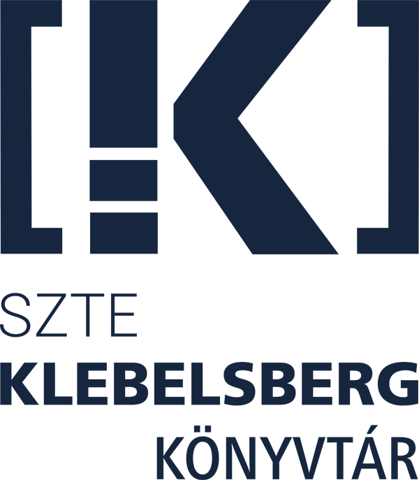 SZTE Klebelsberg Könyvtár logo